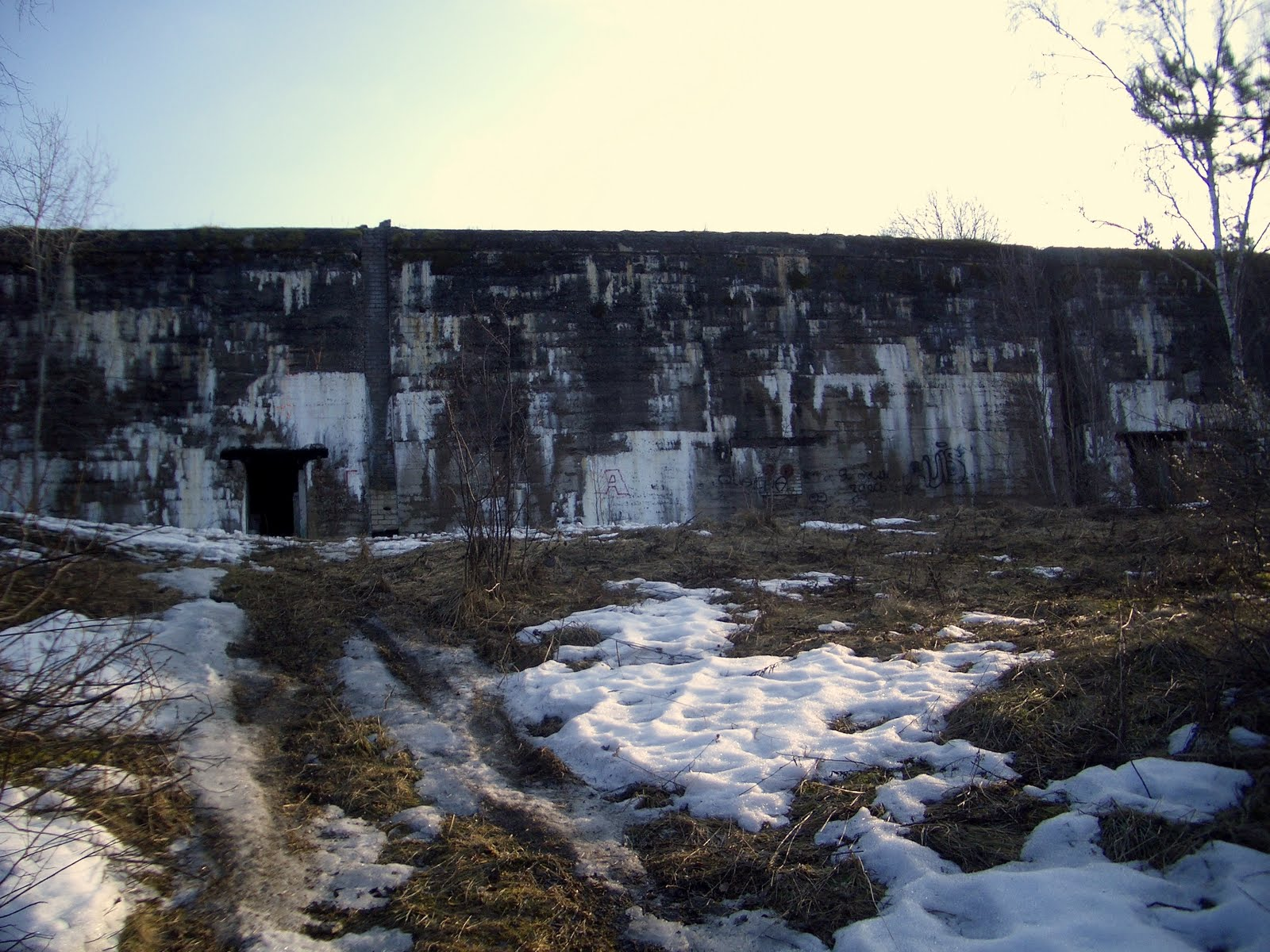 Peeter Suure Merekindluse Türisalu- Naage positsiooni rooduvarjend, 1917. a.